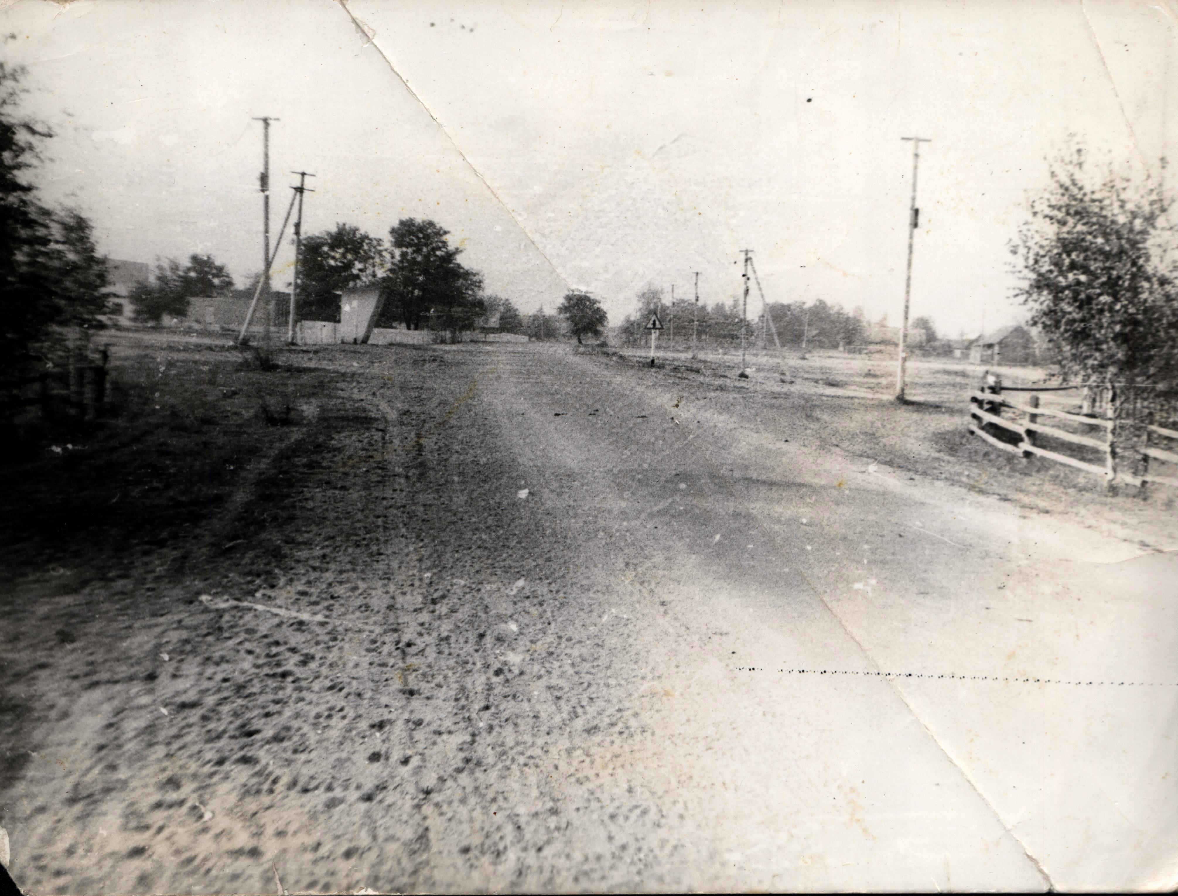 Центральная улица с. Возничи